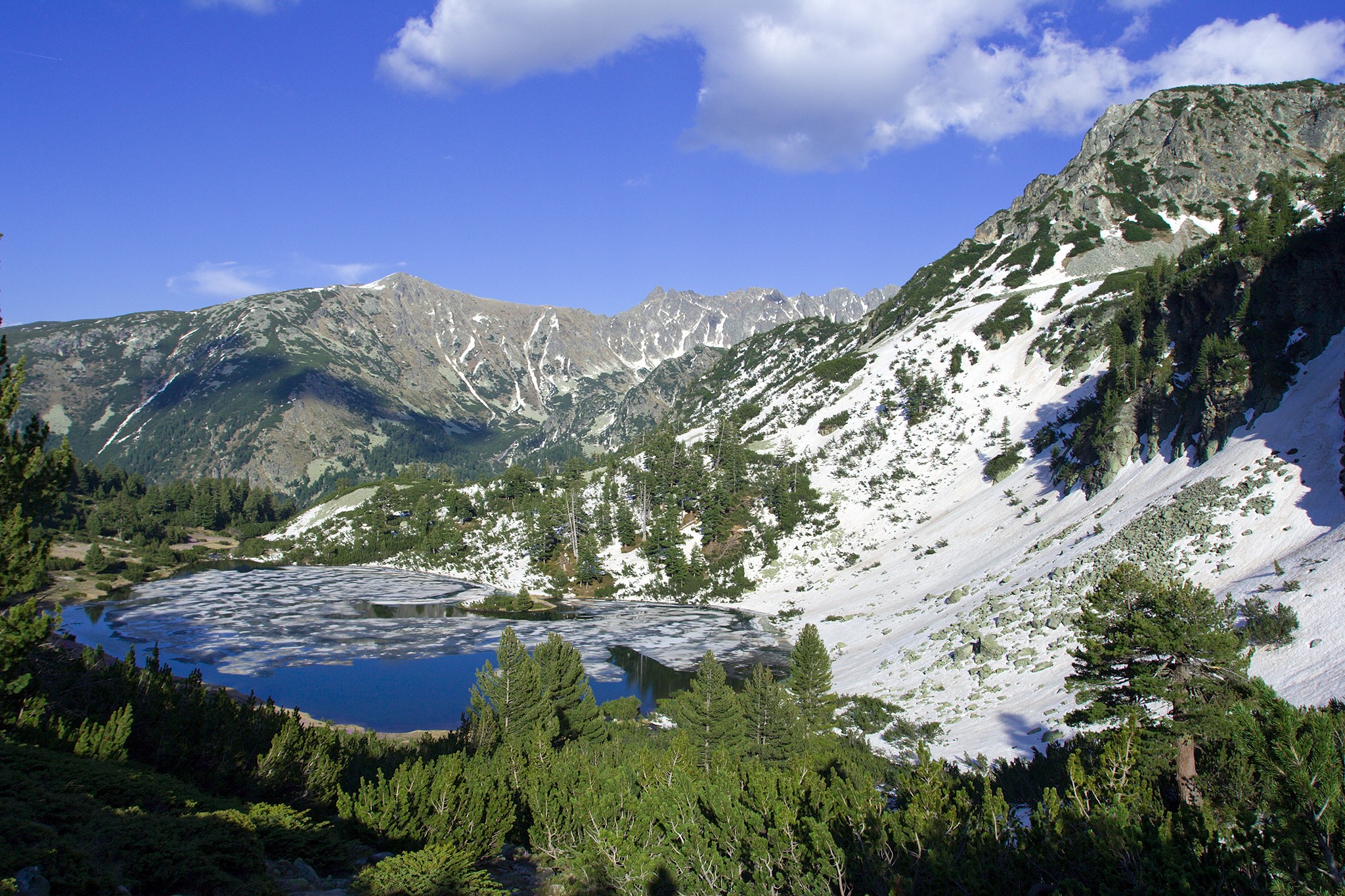 Долното Василашко езеро, поглед от моренния вал при Горното Василашко езеро. На заден план вляво - в. Каймакчал, в средата - каменния ръб Стражите.